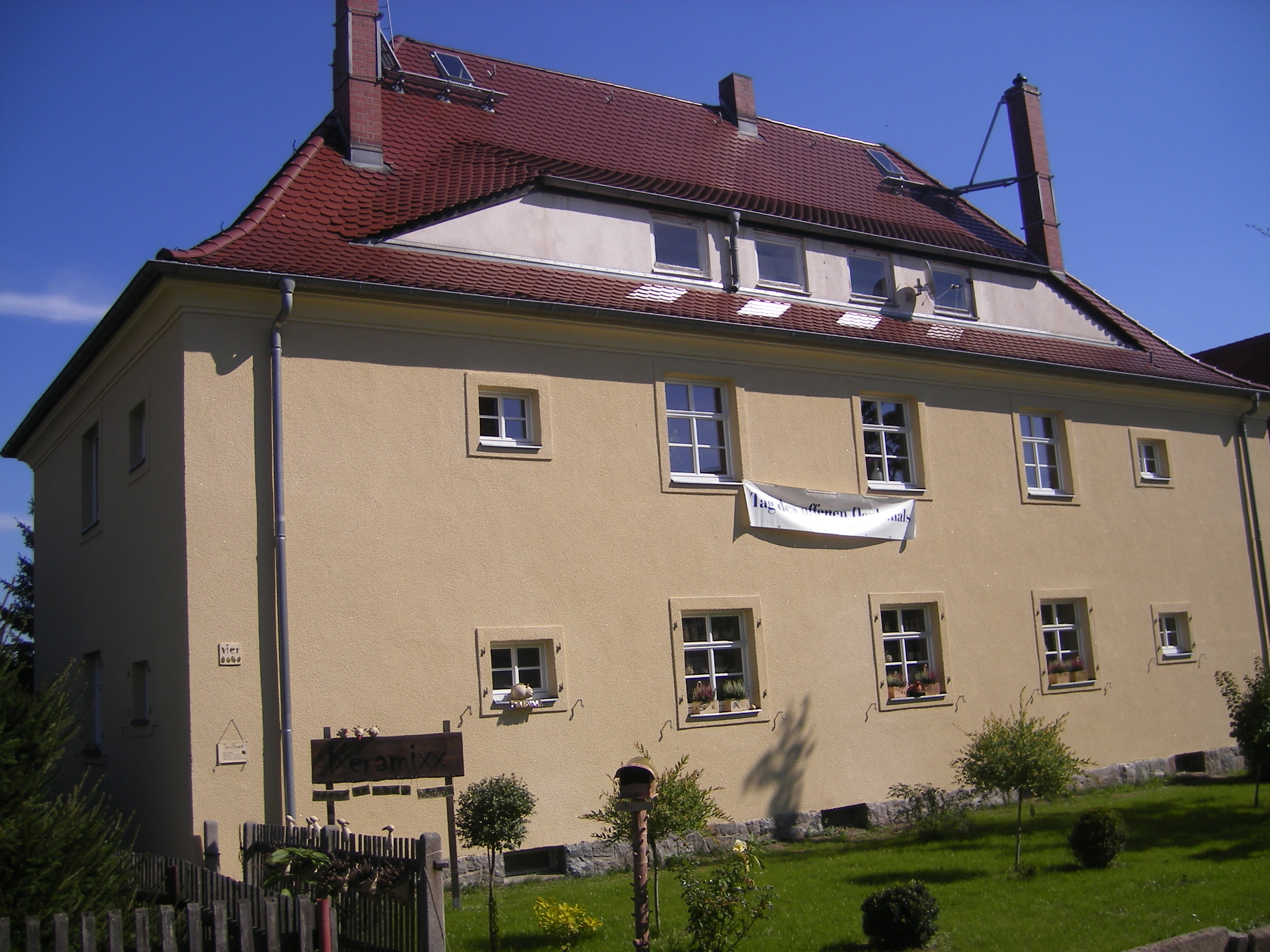 Ein Haus der Eisenbahnersiedlung in Altenburg-Rasephas in Ostthüringen.